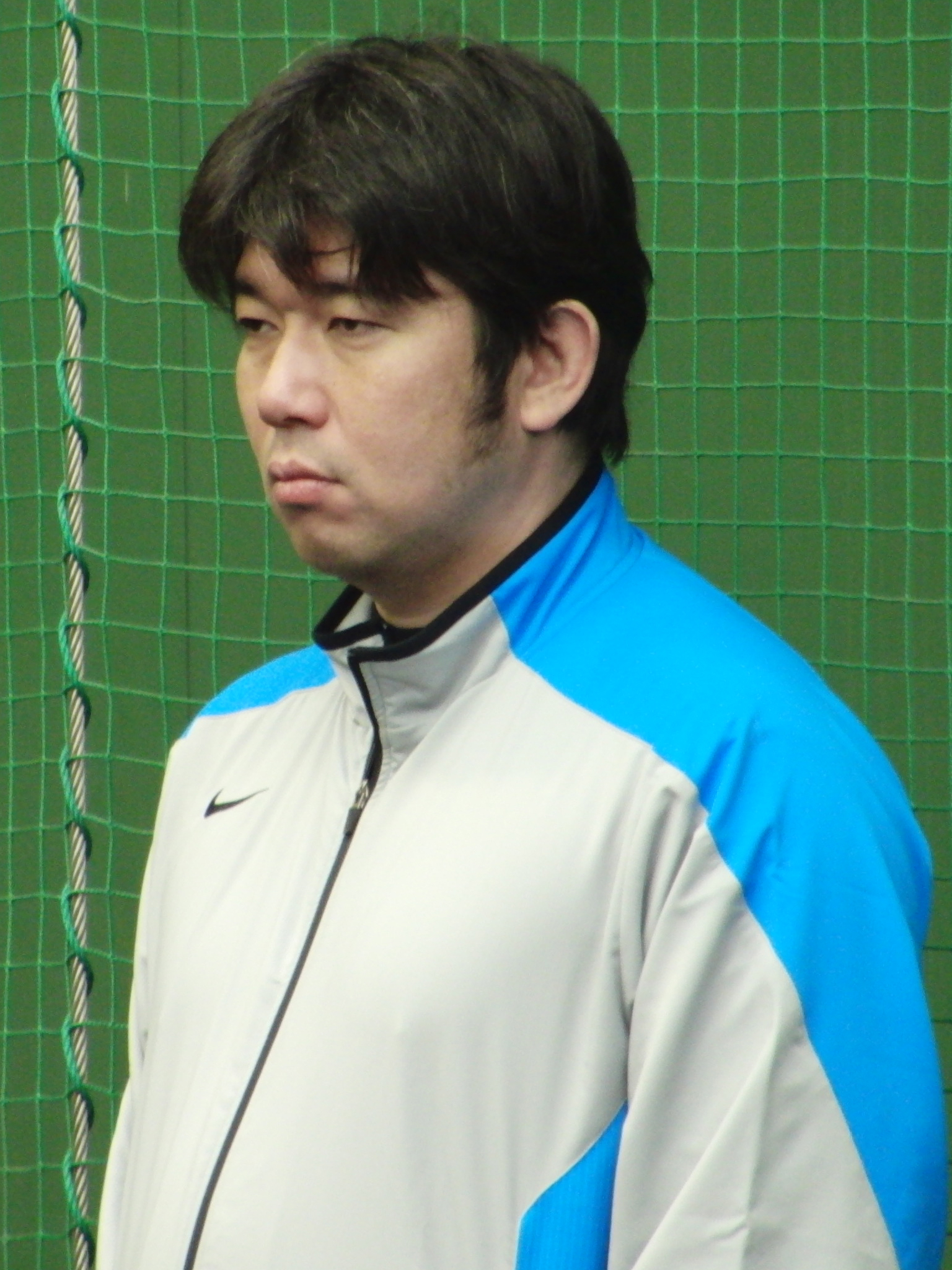 元プロ野球選手（投手）、野茂英雄。日南市天福球場にて。